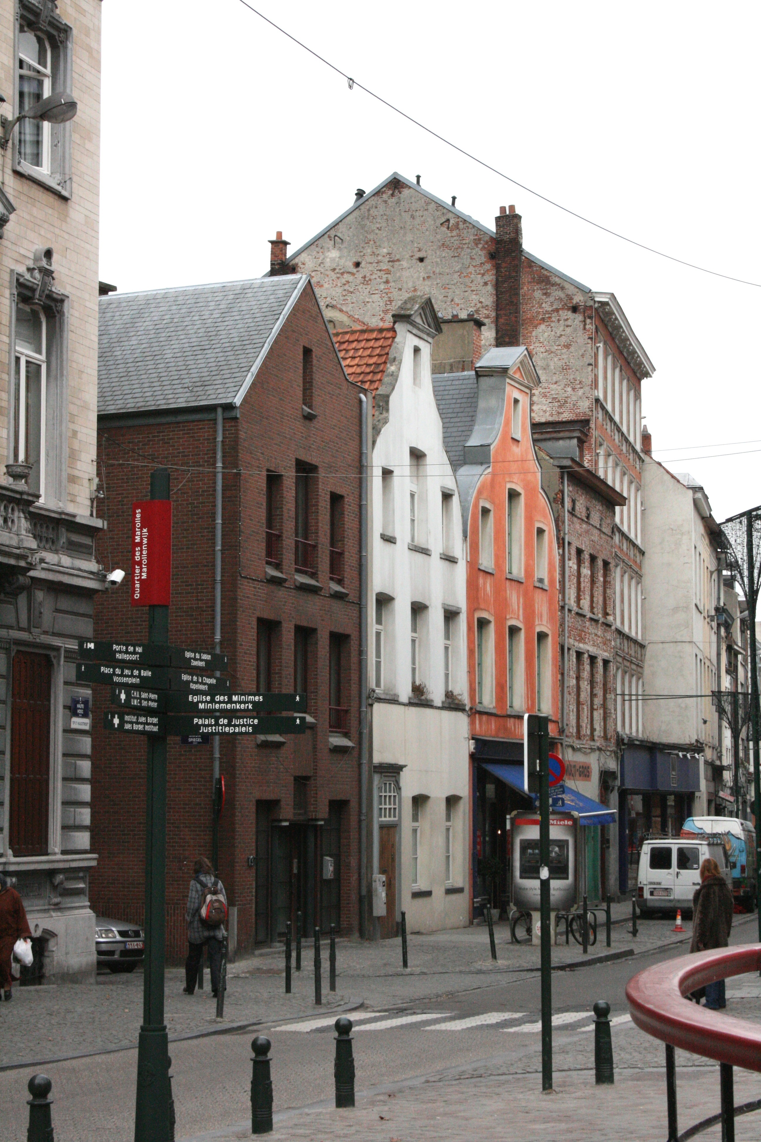 Rue Haute, Bruxelles (Belgique)